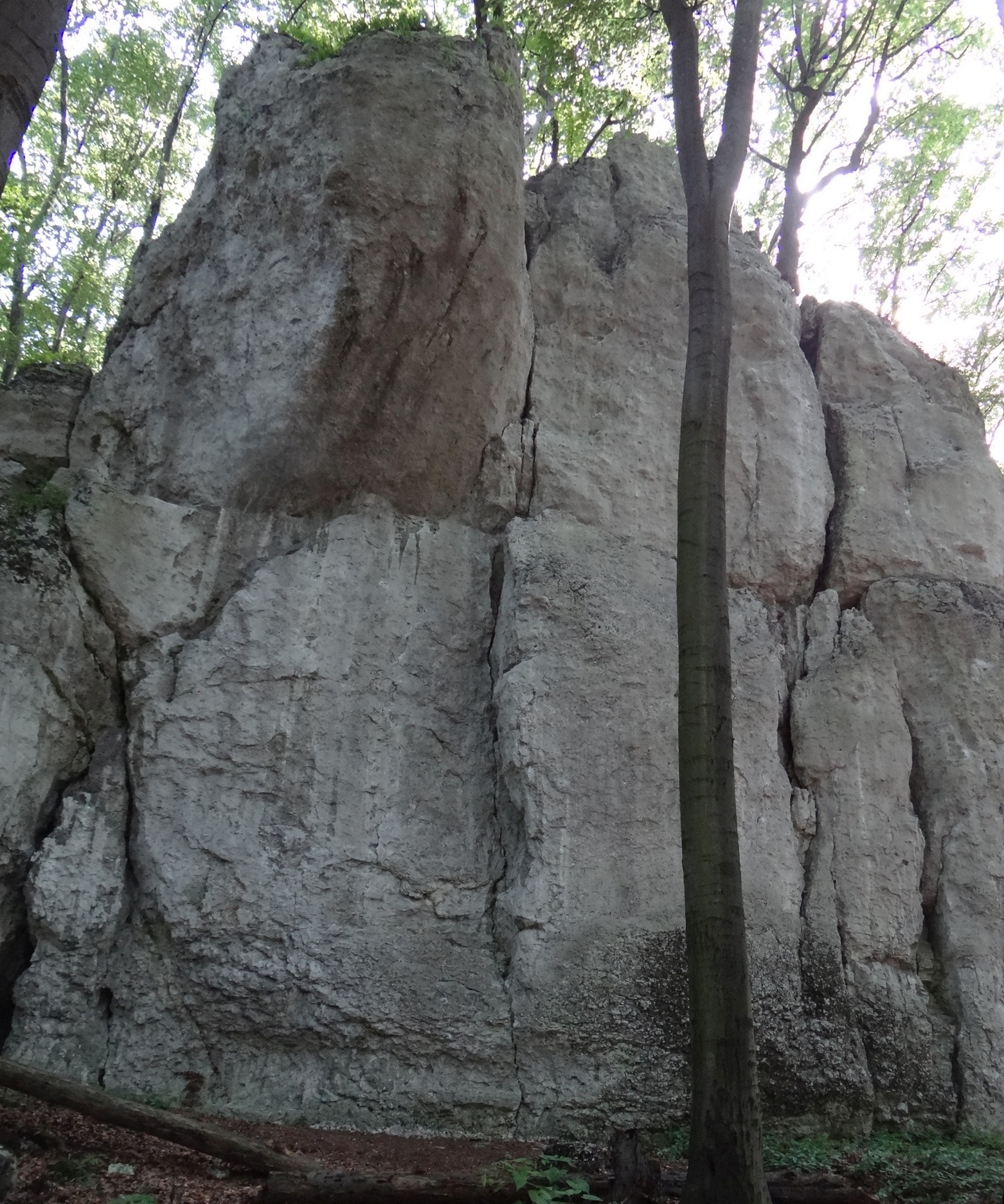 Zubowe Skały w rezerwacie przyrody Pazurek. Skała Główny Mur